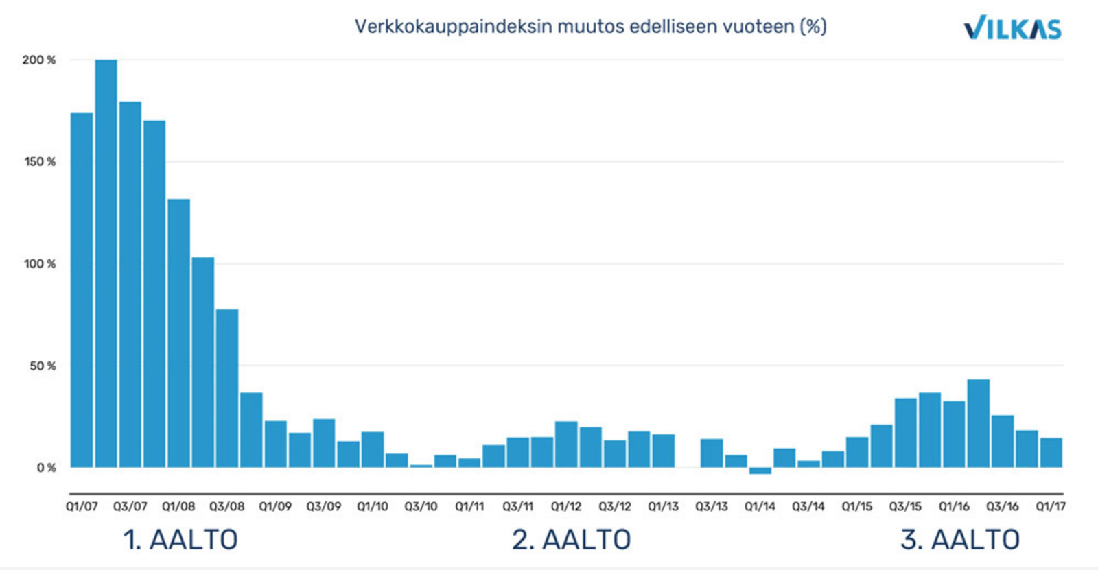 Kymmenen vuoden 2006-2016 aikana on nähtävissä kolme eri voimakasta kasvuaaltoa ja kaksi heikompaa kehitysjaksoa tai taantumaa. Nyt käynnissä oleva tuorein laskukausi voitanee tulkita kolmanneksi heikommaksi kehitysjaksoksi.